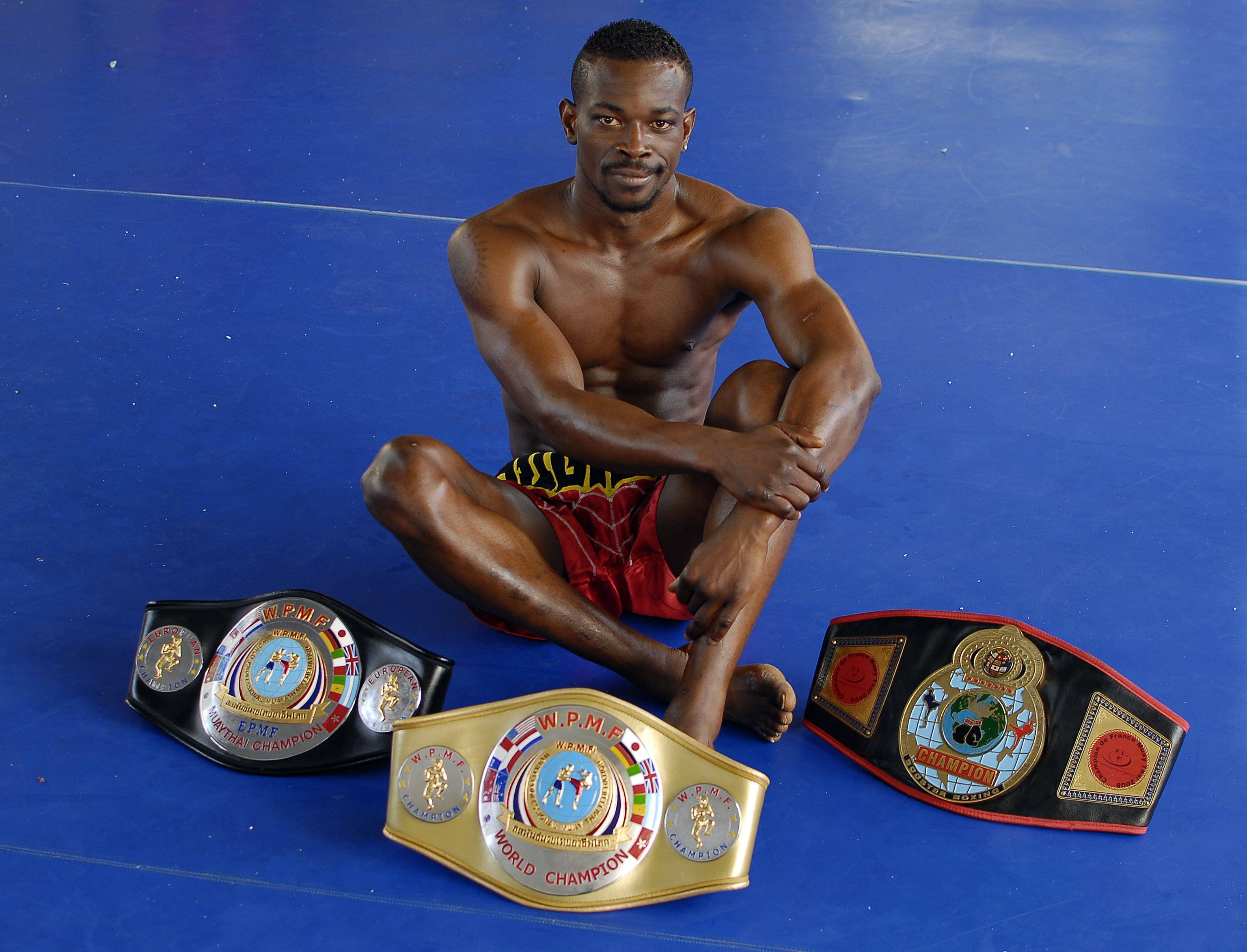 Le 2 avril 2011, le brestois Aïello Batonon devient champion du monde de boxe thaïlandaise dans la catégorie des moins de 75kg.